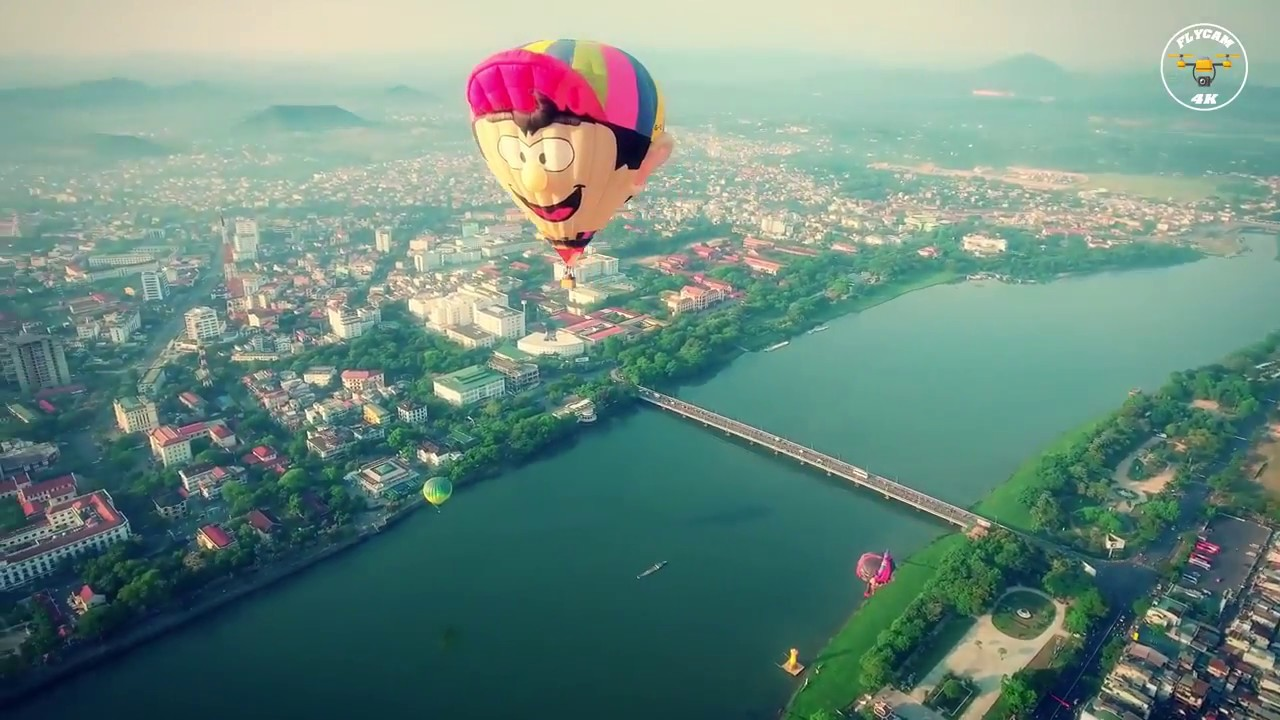 Huế Trên Cao